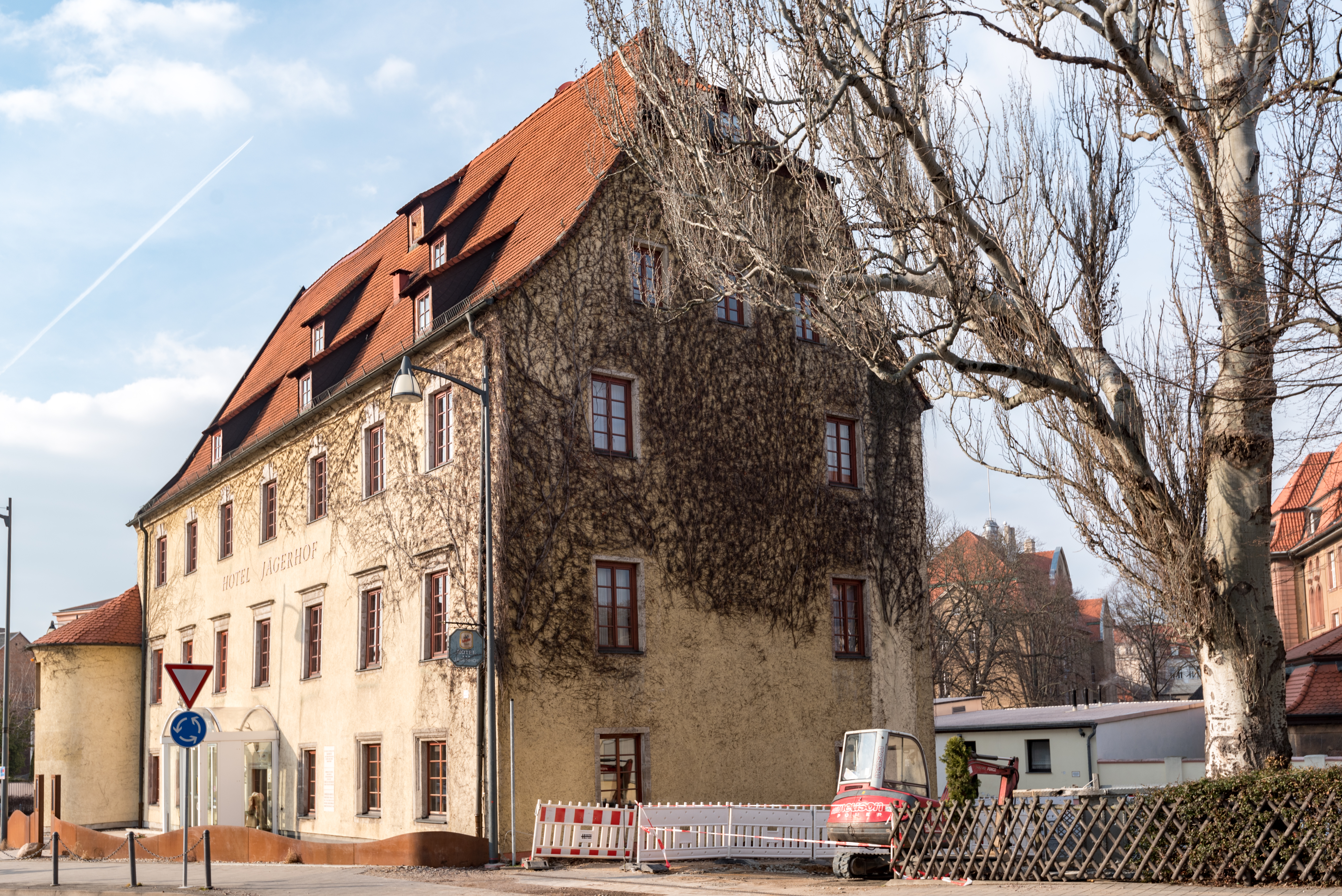 Weißenfels, Nikolaistraße 51